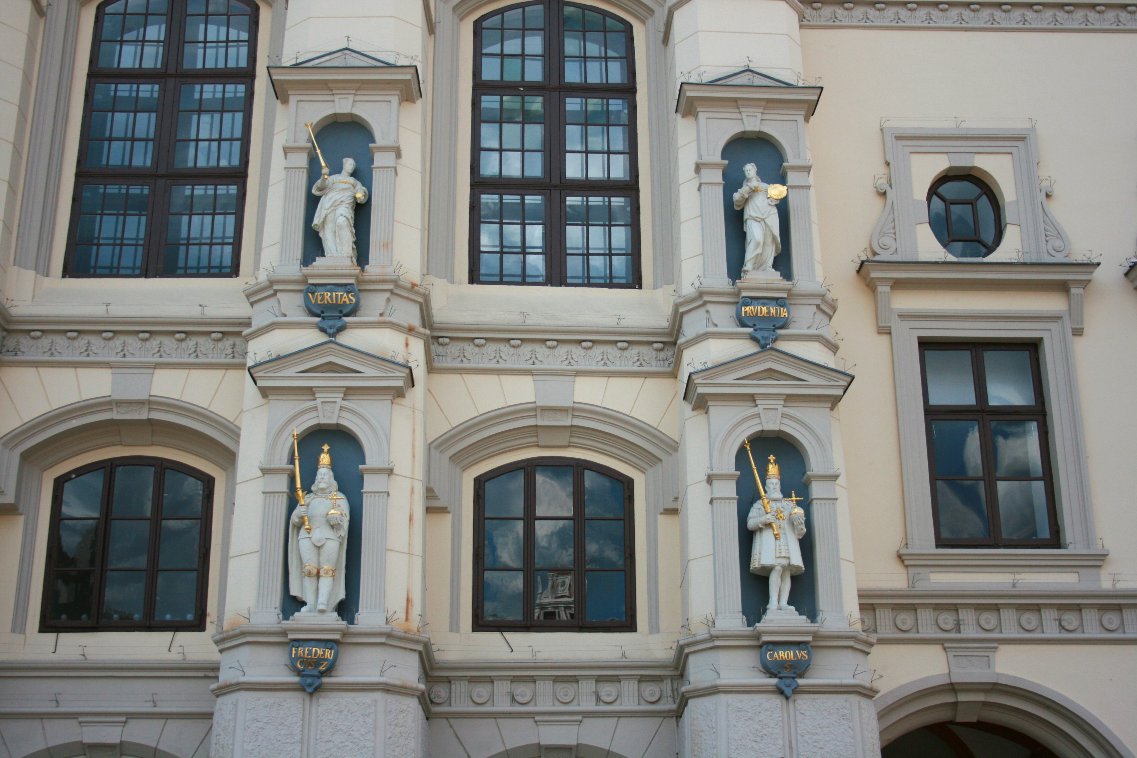 Rathaus, Am Markt in Lüneburg, Marktfassade mit Skulpturen von Hans Schröder (1604–1607)